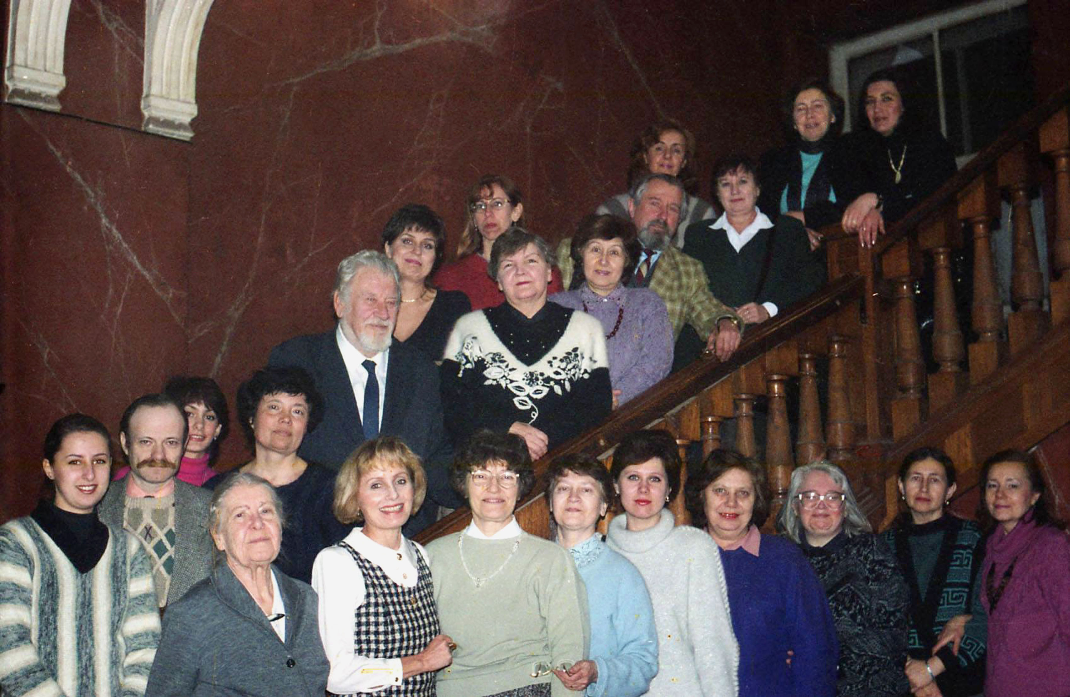 Известный украинский композитор, теоретик, педагог Кравцов Тарас Сергеевич со своими учениками разых лет сфотографированы мною на лестнице, ведущей к Концертному залу Харьковского института Искусств им.И.Котляревского (ныне Харьковскогонационального университета искусств) в начале 90-х г.г.